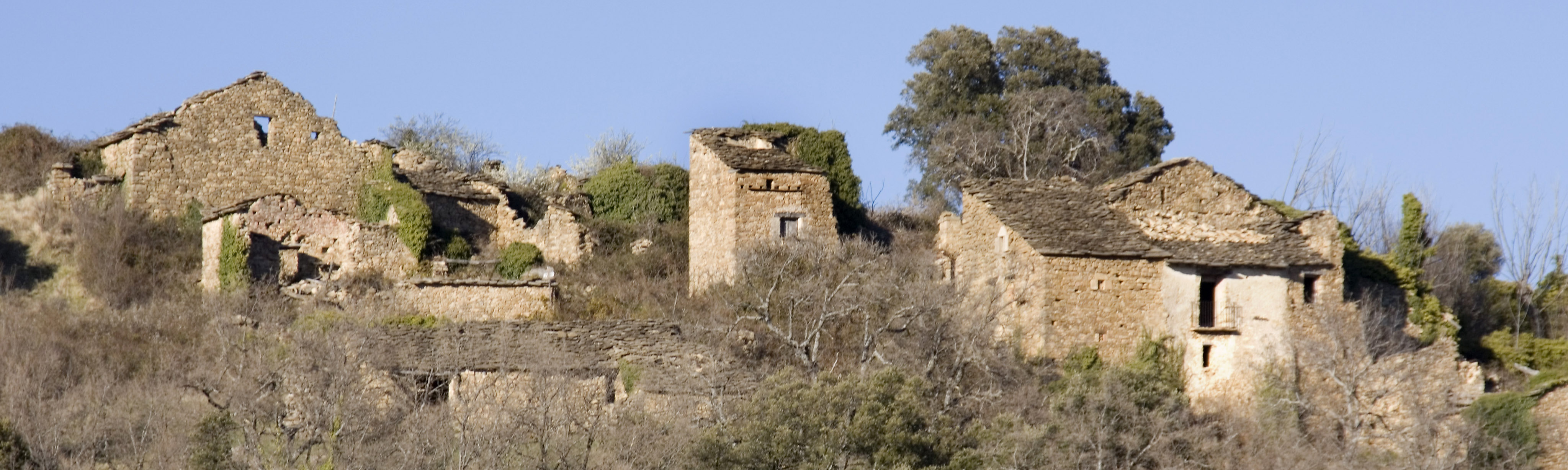 Rin de la Carrasca es un poble del municipi d'Isàvena, a la Ribagorça aragonesa. Són dues cases amb les seues bordes: Rin de dalt a l'esquerra i Rin de baix a la dreta. El poble està a la Serra del Jordal.